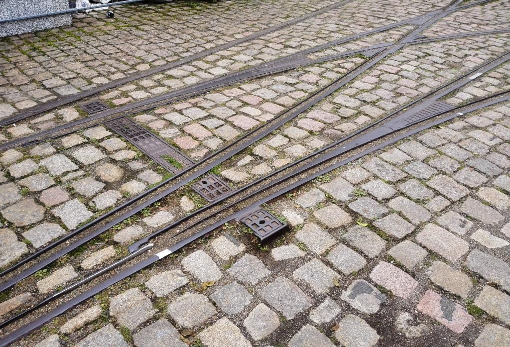 Drehstuhlweiche, Baujahr 1905, in Dresden-Gohlis